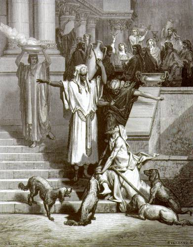 Gravure sur le Nouveau Testament